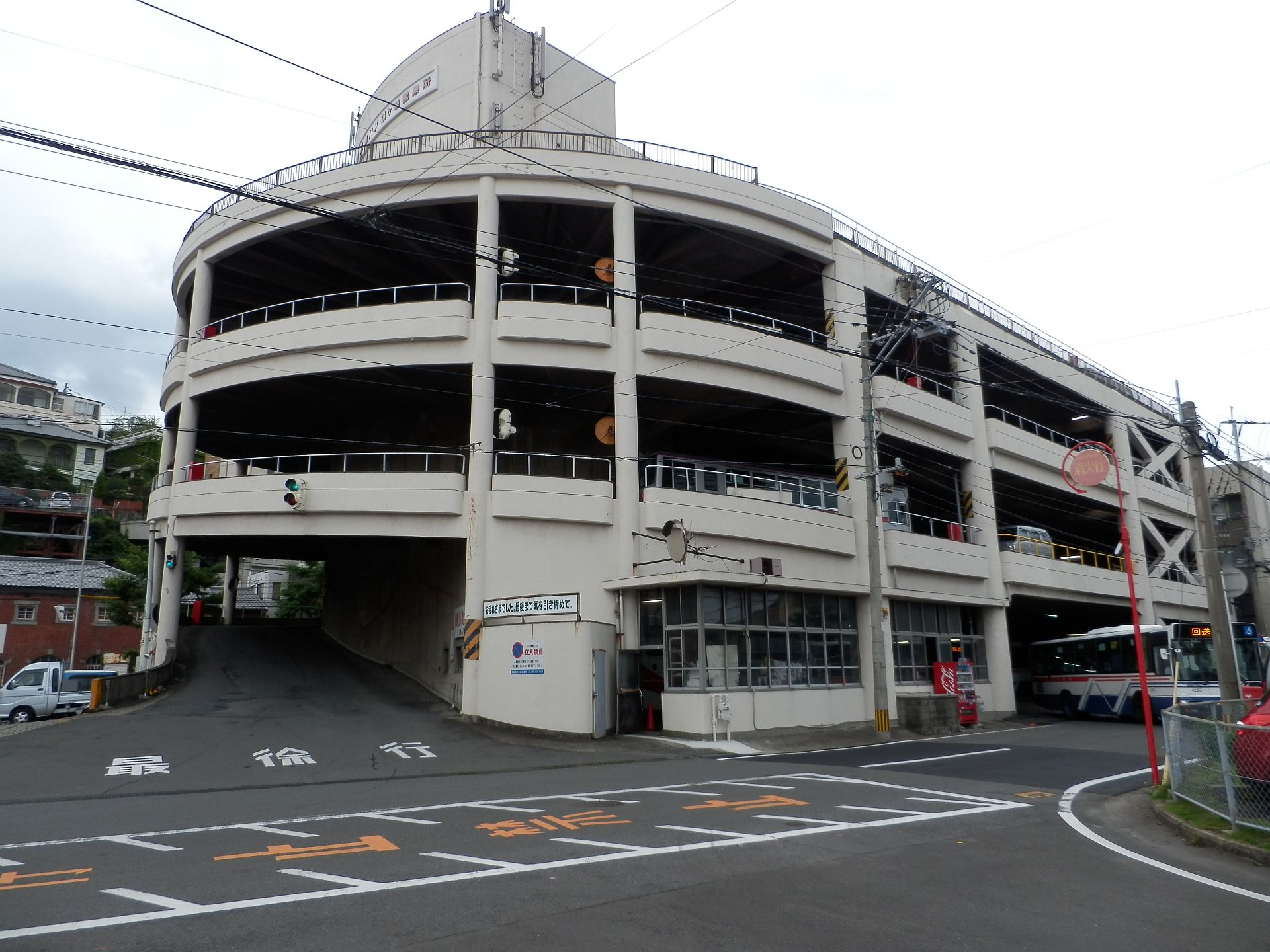 長崎バス松ヶ枝営業所裏側